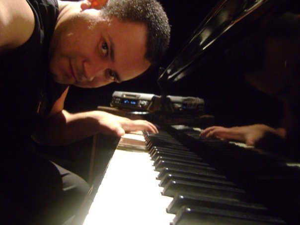 Fredy en el piano en la gira Viaje al Sentimiento, en Sao Paulo